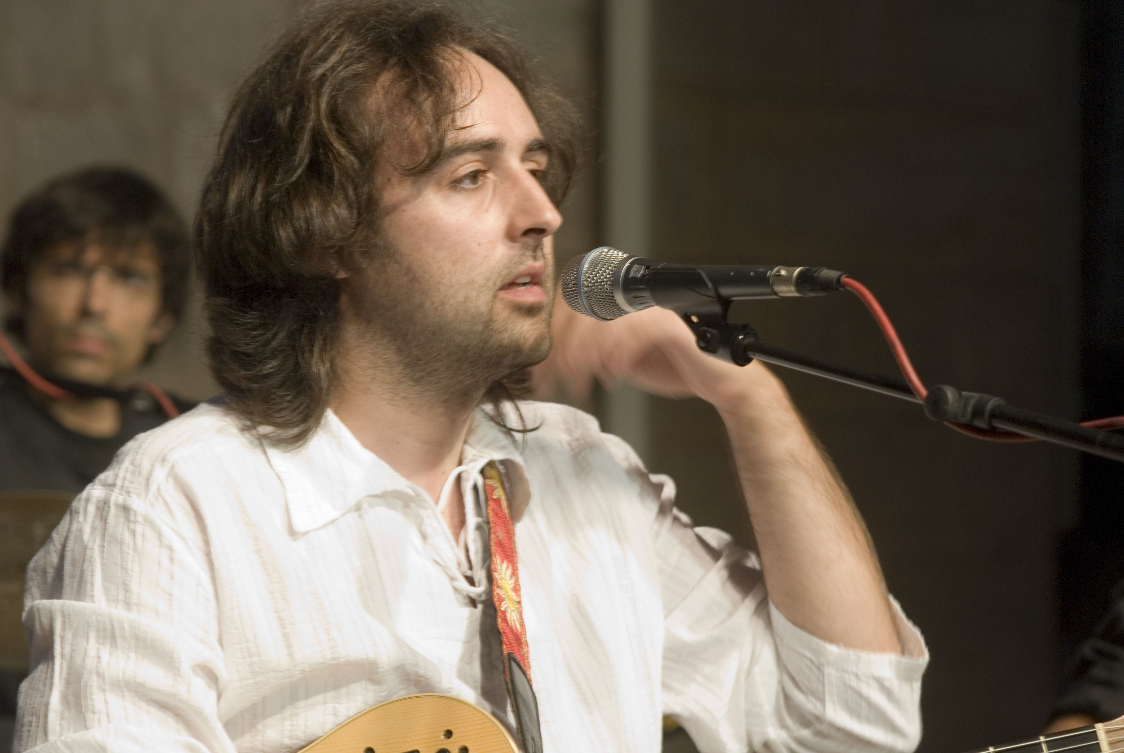 Roger Mas al MHC el 2007.